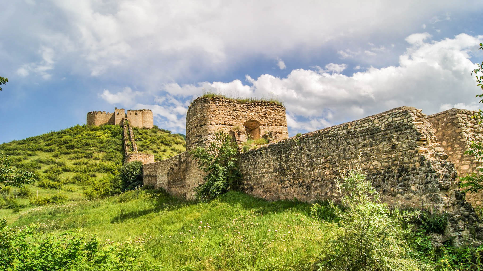 Əsgəran qalası